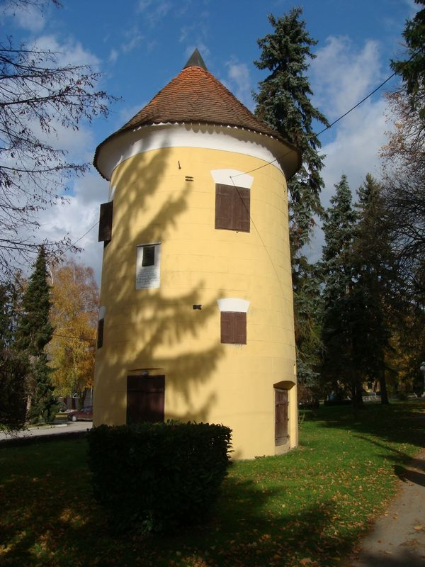 Kula Petra Zrinskog u Vrbovcu